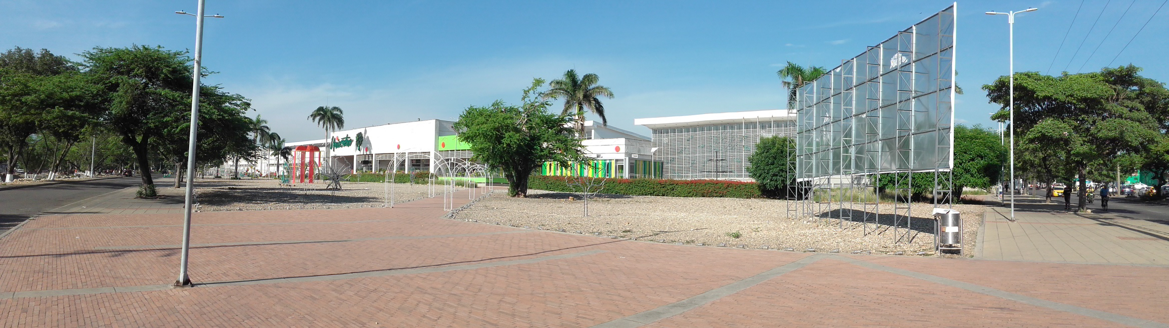 gnngkgkj